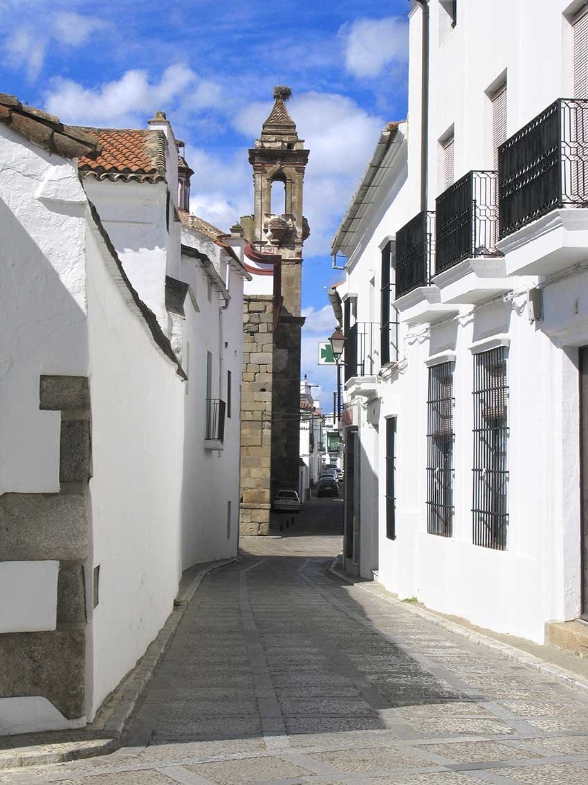 Corredera de Fregenal